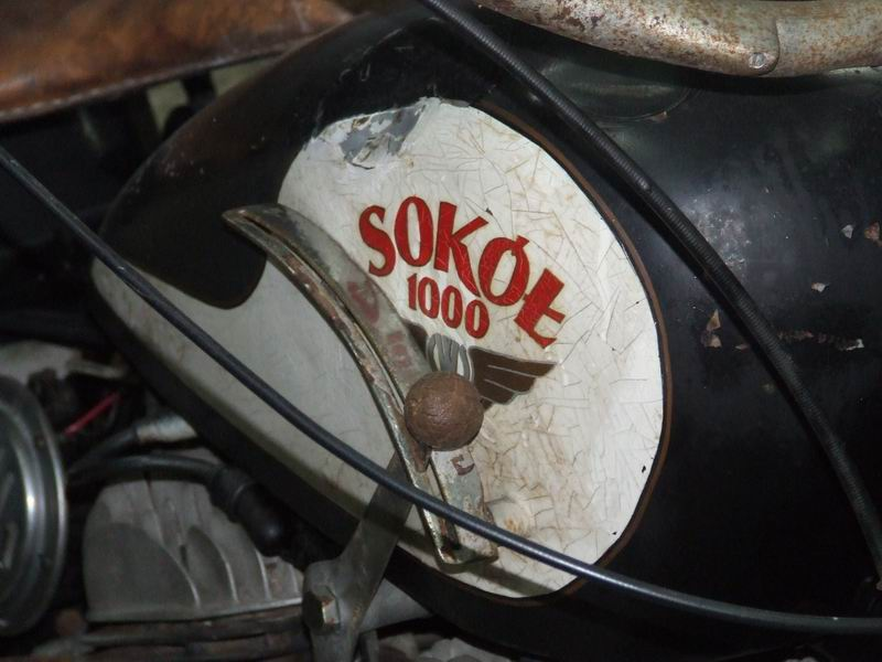 Polish Sokół 1000 motorcycle logo.